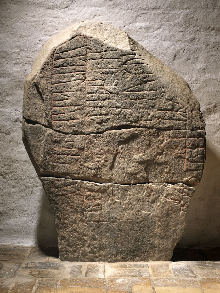 Foto: nationalmuseet ved Roberto Fortuna